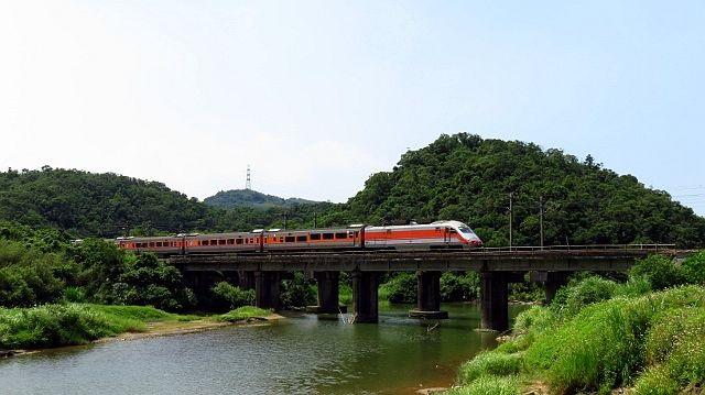 中文（台灣）: 臺灣鐵路管理局推拉式自強號通過宜蘭線第三雙溪橋。